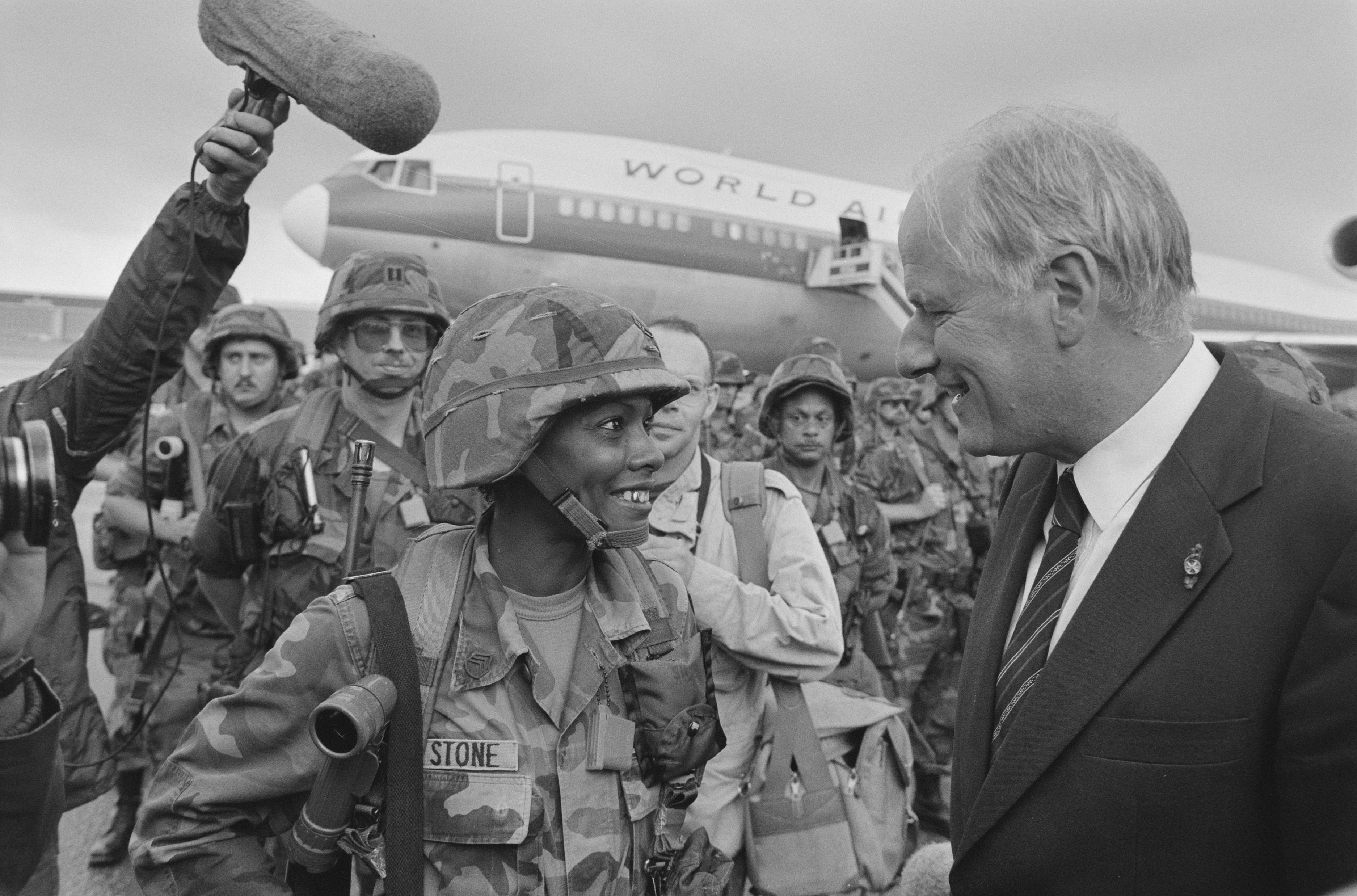 Collectie / Archief : Fotocollectie Anefo Reportage / Serie : [ onbekend ] Beschrijving : Aankomst Amerikaanse militairen i.v.m. oefening Reforger op Schiphol; minister Van Eekelen in gesprek met VS-militair Datum : 26 augustus 1987 Trefwoorden : GESPREKKEN, MILITAIREN, aankomsten, ministers Persoonsnaam : Eekelen, Wim van Fotograaf : Croes, Rob C. / Anefo Auteursrechthebbende : Nationaal Archief Materiaalsoort : Negatief (zwart/wit) Nummer archiefinventaris : bekijk toegang 2.24.01.05 Bestanddeelnummer : 934-0596